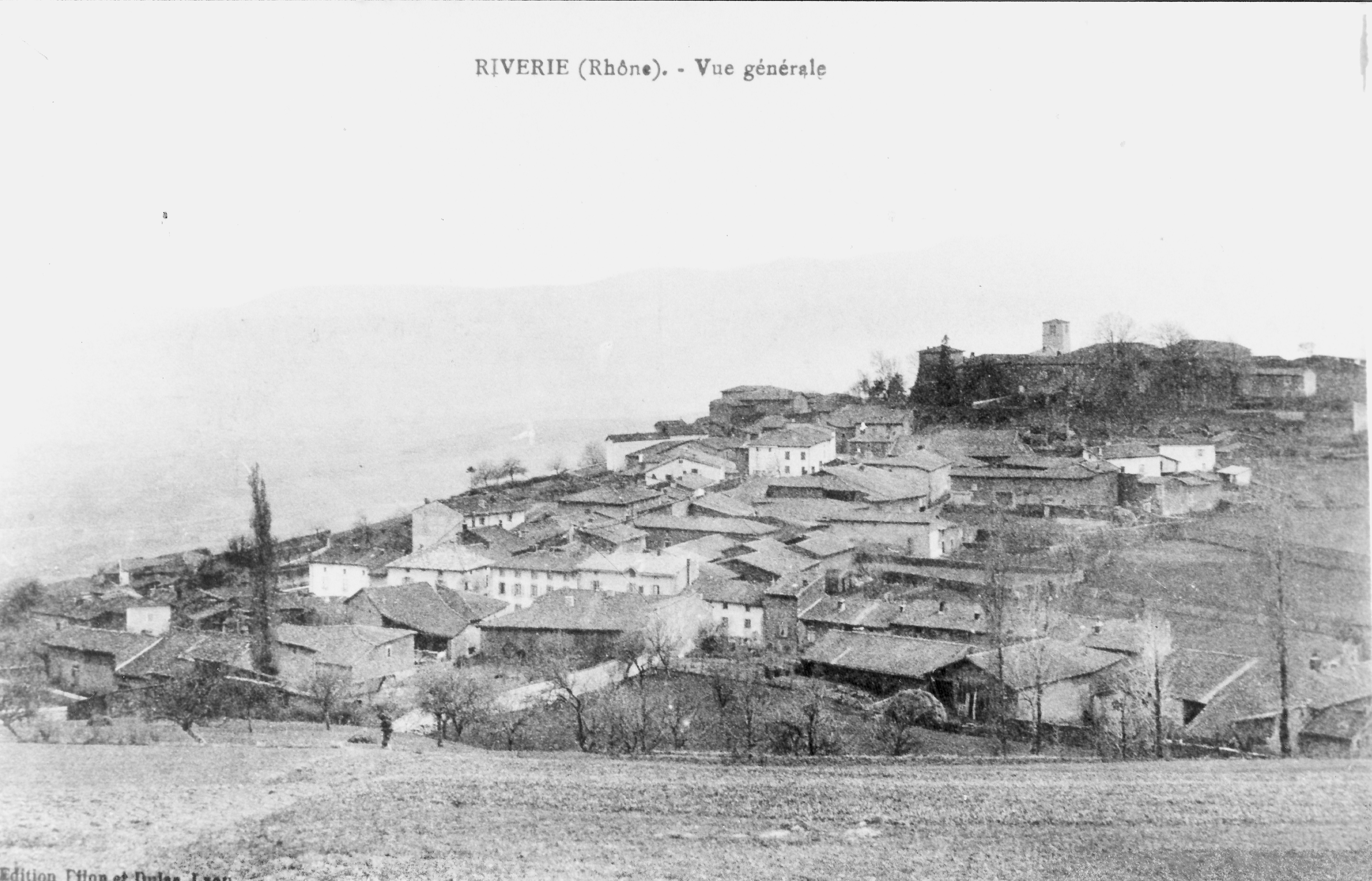 Vue Générale du nord-est vers le sud, en arrière-plan le massif du Pilat. - Riverie (Rhône)